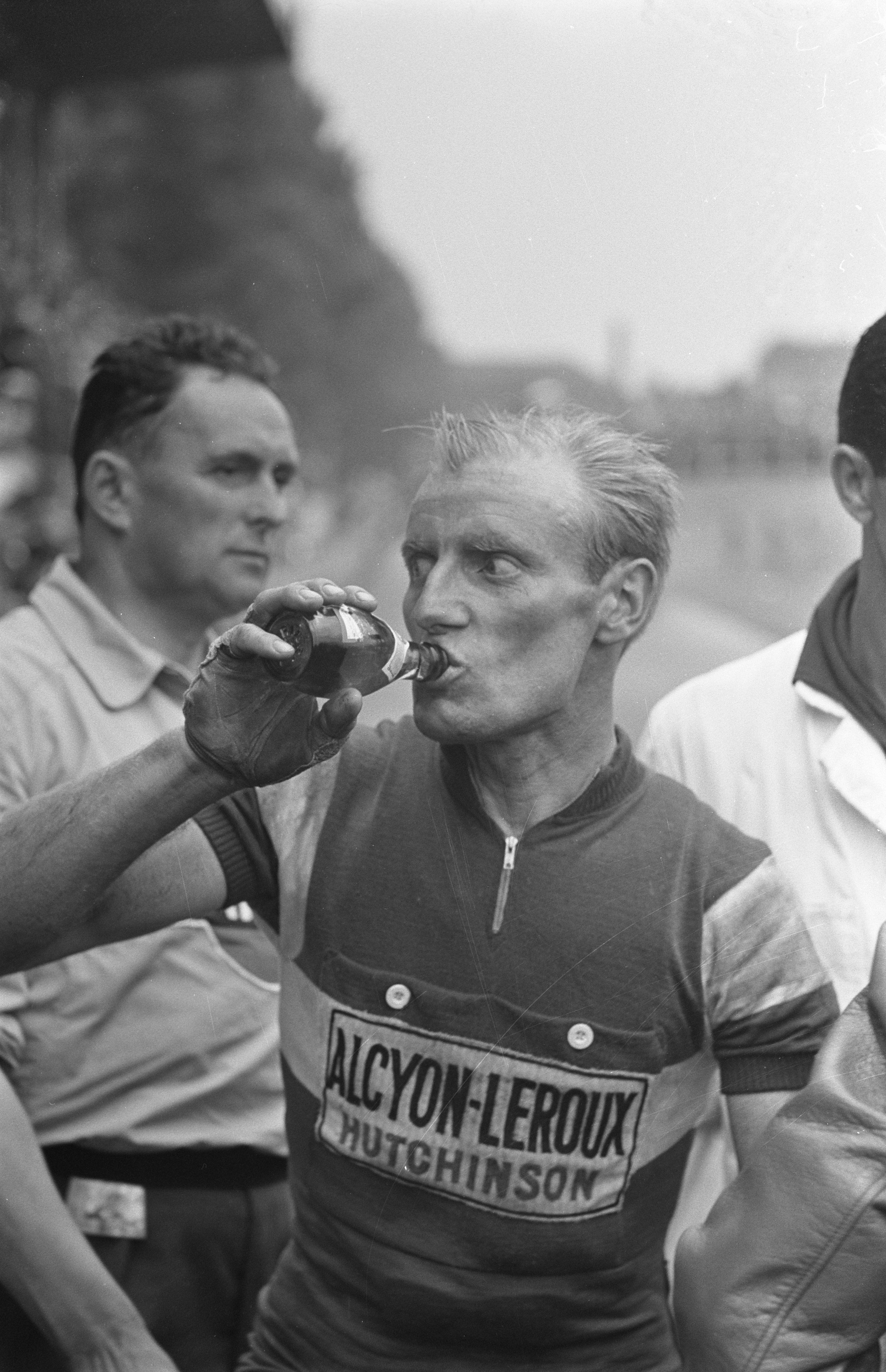 Andre Darrigade.